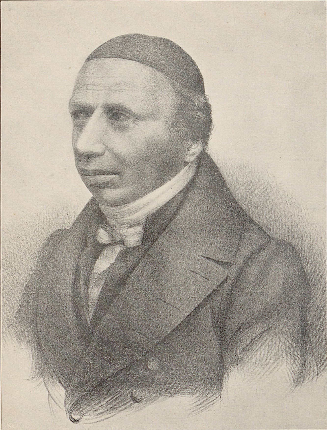 Johannes Mathias Seling, Pfarrkaplan in Osnabrück